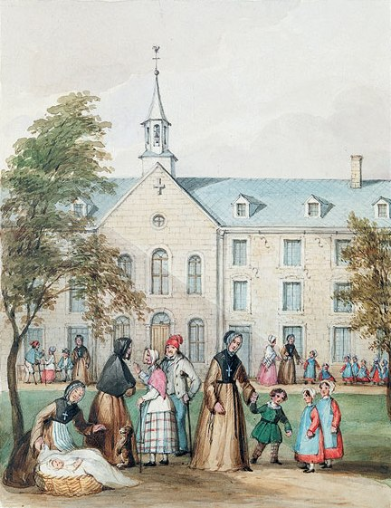 Illustration de James Duncan (1806-1881) tirée de Jacques Viger, Costumes des communautés religieuses de femmes en Canada avec un Précis historique, 1853-1854. Bibliothèque centrale de Montréal, 255.90097 V674coD.